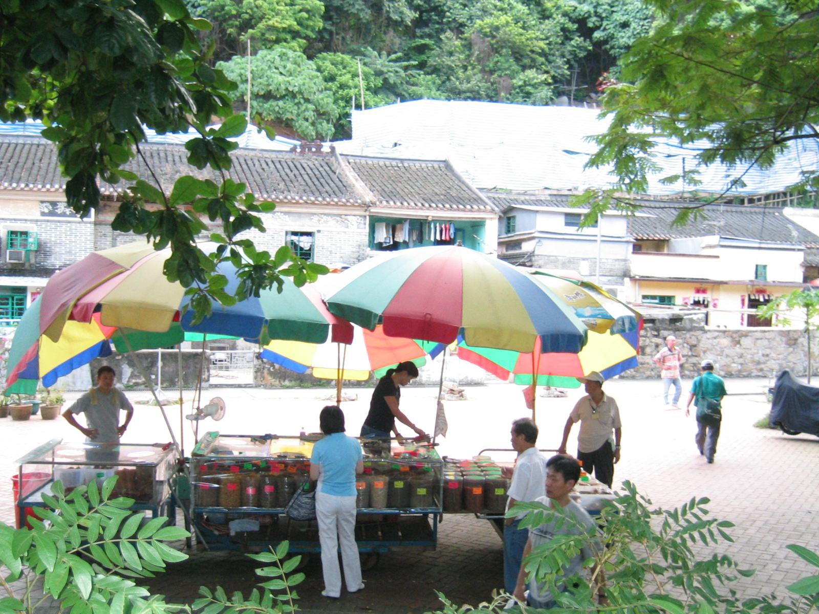 A stall selling local Hong Kong snack at Pai Tau Village, Shatin, Hong Kong